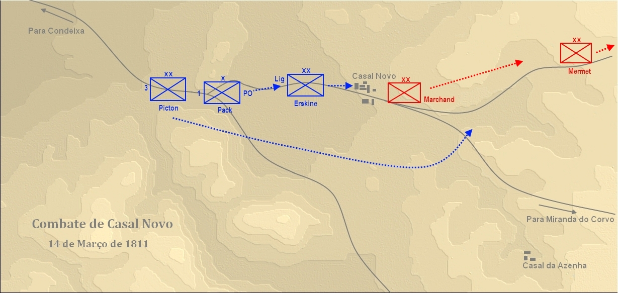 Mapa com esquema das posições e movimentos no Combate de Casal Novo